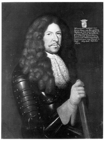 Porträt des Generalfeldmarschalls Alexander von Spaen (*Kranenburg, 14 januari 1619 - Kleve, 23 oktober 1692)